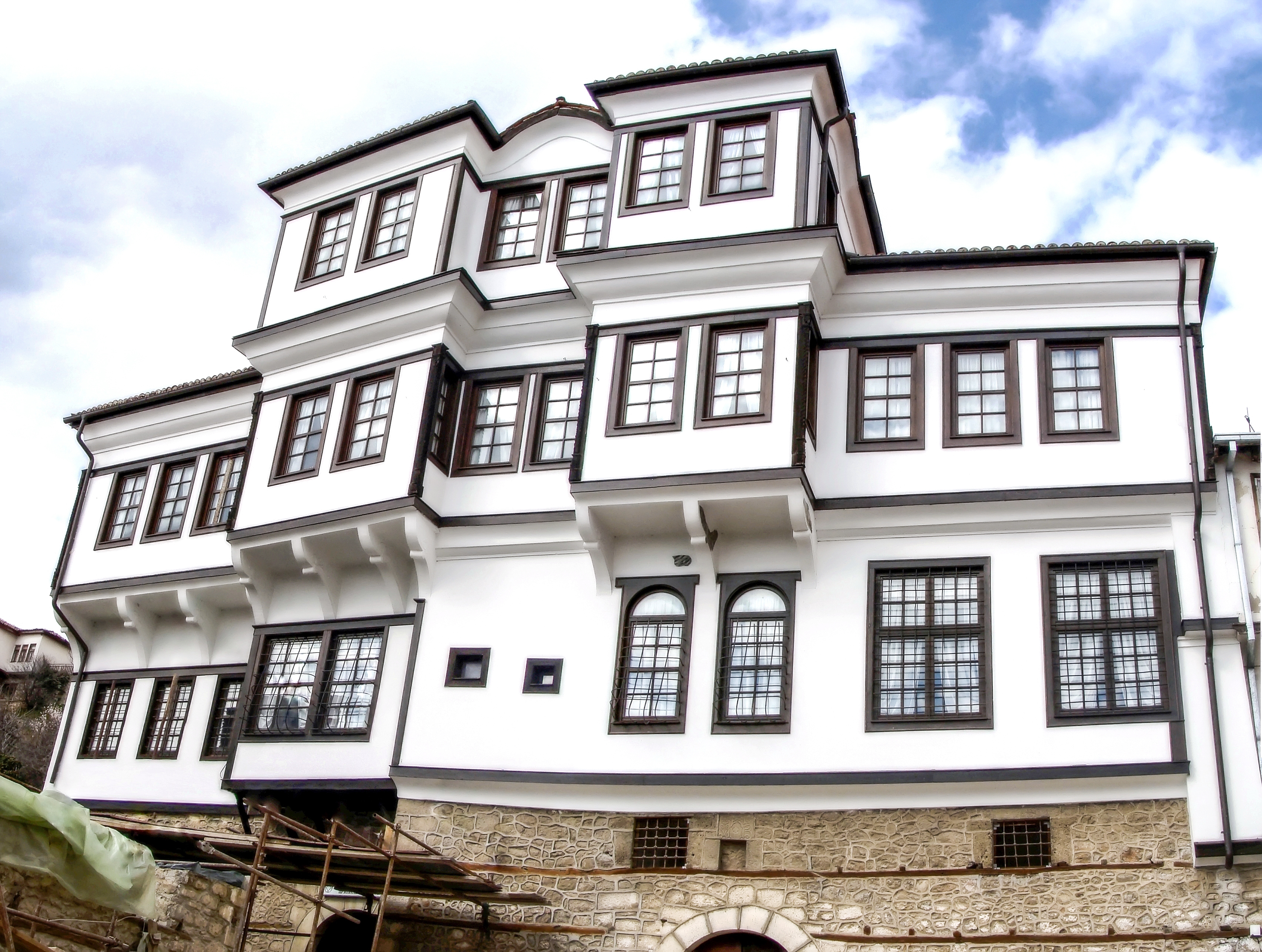 Куќата на Робевци (Музеј на град Охрид) во целост, сликано за време на обновата на куќата на Уранија (МАНУ).